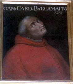 Cardeal Giovanni Boccamazza